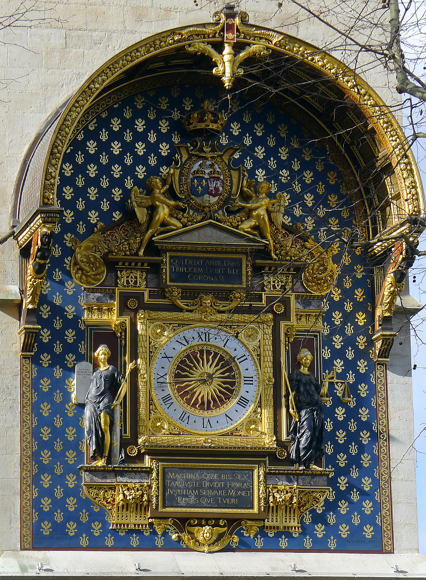 Conciergerie , horloge Charles V - Paris Ier .